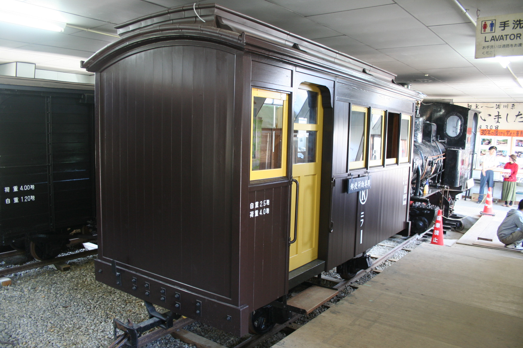 2018年5月5日撮影